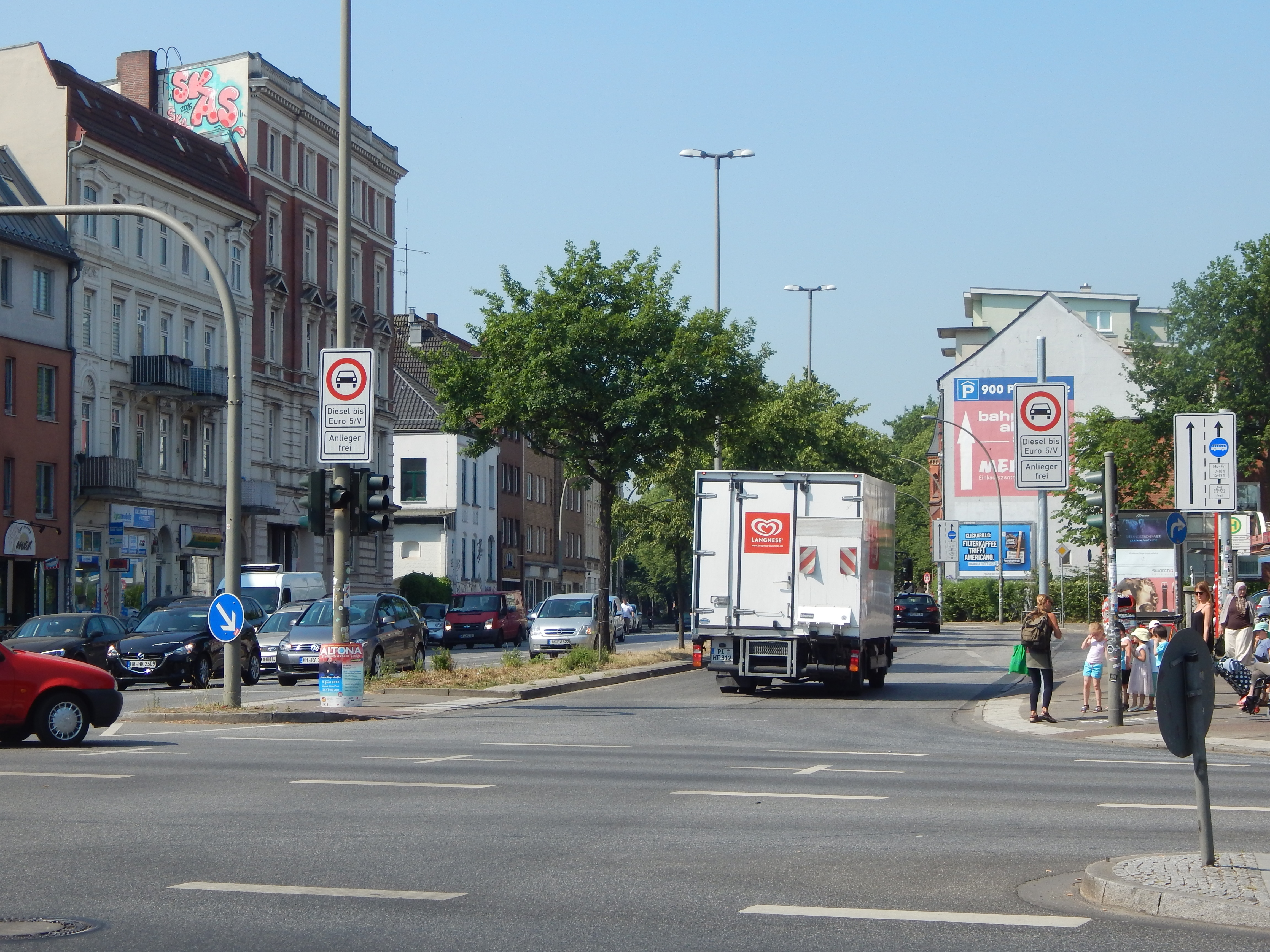 Fahrverbot Hamburg 31. Mai 2018